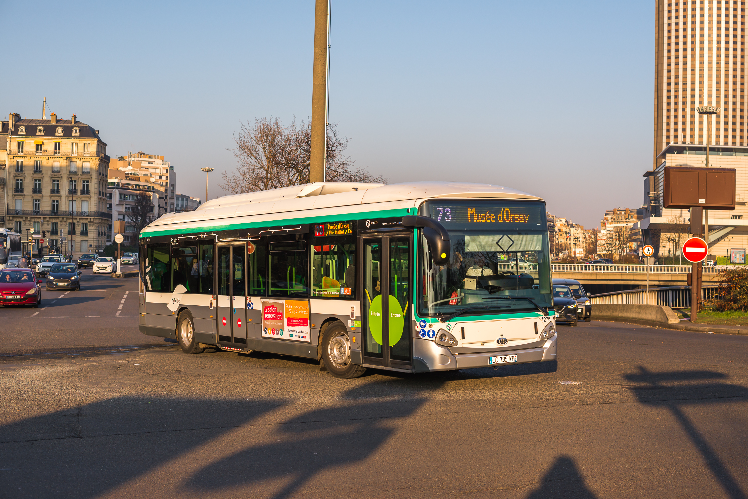 Heuliez GX337 Hybride 1276 RATP, ligne 73, Paris Bus transport in Paris and Île-de-France.